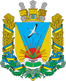 Герб Народицького району